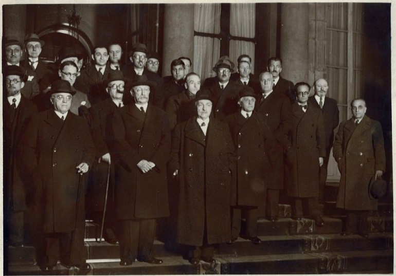 Au verso, légende tapuscrite : « Le nouveau ministère. Le groupe du nouveau ministère formé par M. Léon Blum, à sa sortie de l'Élysée. Au premier plan de gauche à droite : Messieurs [Fernand] Gentin, [Albert] Sarraut, [César] Campinchi, [Vincent] Auriol, [Albert] Rivière, [Maurice] Viollette, [Ludovic-Oscar] Frossard, [Joseph Paul-]Boncour, [François] de Tessan, [Pierre] Cot, [Gaston] Manent, Paul Faure, au 2ème plan de gauche à droite : Messieurs [Henri] Tasso, [Albert] Sérol, [Marx] Dormoy, [Pierre] Mendès-France, Léo Lagrange, [Jules] Moch, [Jean] Zay, [Georges] Monnet, [André] Liautey, [François] Blancho cachant Philippe Serre et [Charles] Spinasse. Photo Henri Manuel Paris le 14 mars 1938. » Inscription manuscrite : « Blum ». Tampon de l'agence photographique : « Henri Manuel 27, rue du Faubourg Montmartre, Paris ». H. 12,9 - L. 18 cm.